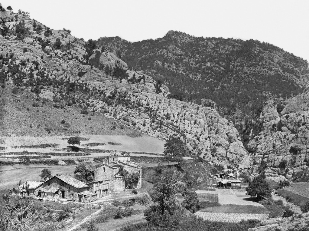 Imatge